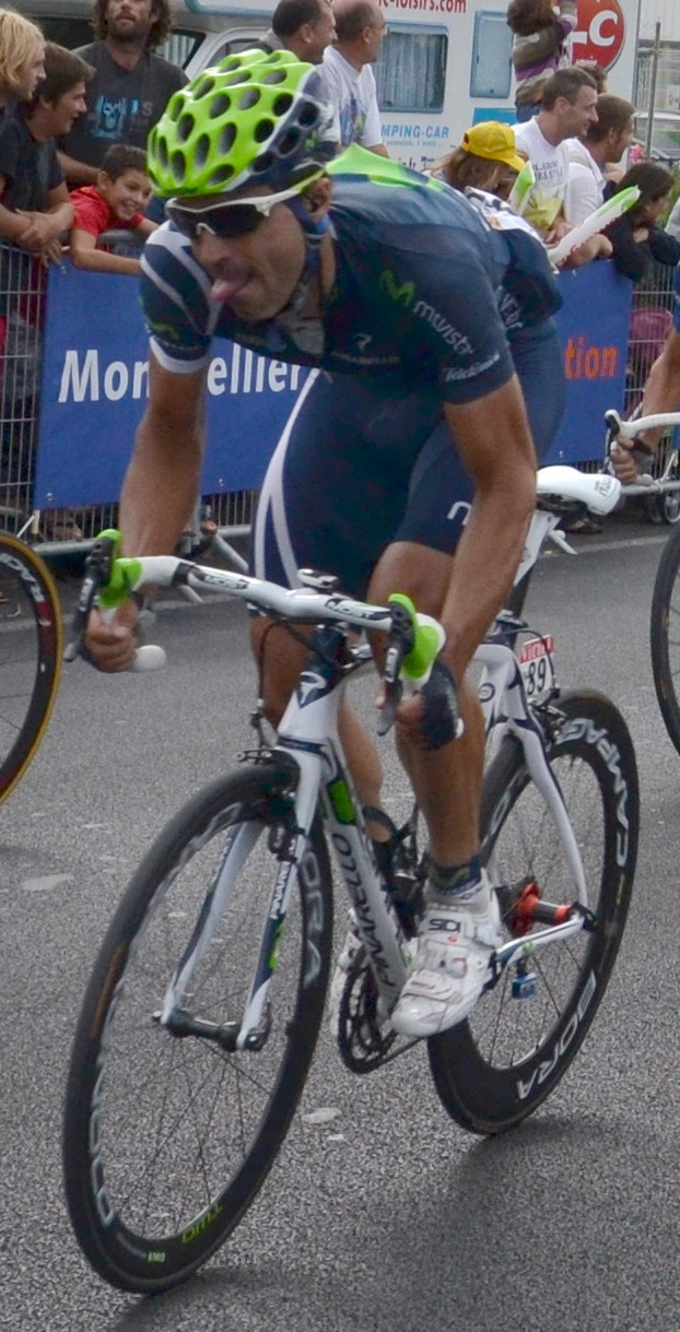 Francisco Ventoso lors de l'arrivée de la 15e étape du Tour de France 2011.